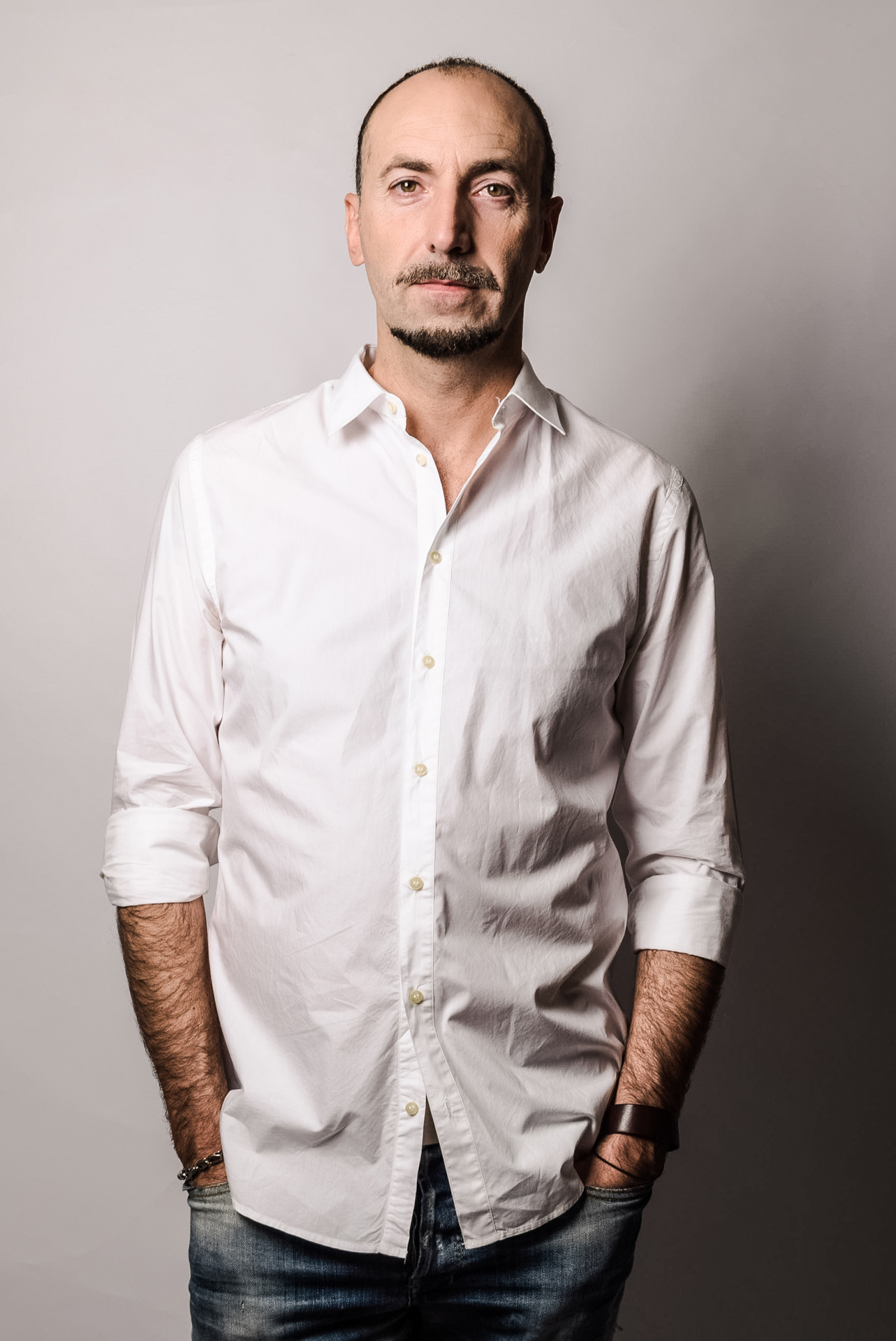 Immagine